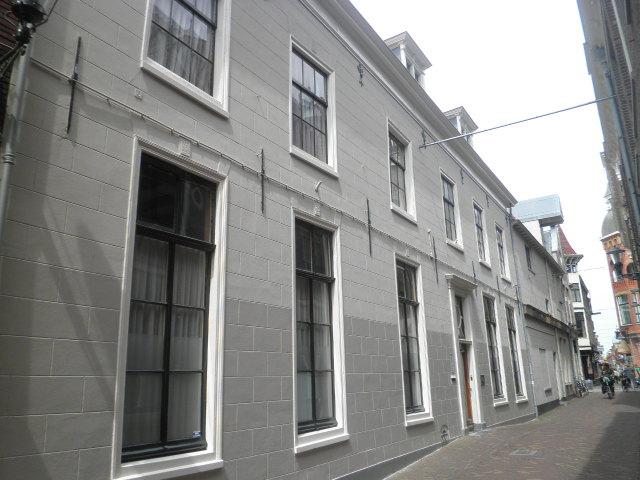 Huis van Zessen. Zes traveeën breed pand met een in blokken gepleisterde lijstgevel. Voordeur met bovenlicht. Op de verdieping negenruitsschuifvensters, op de beganegrond achtruits met middenstijl. XIXe eeuw